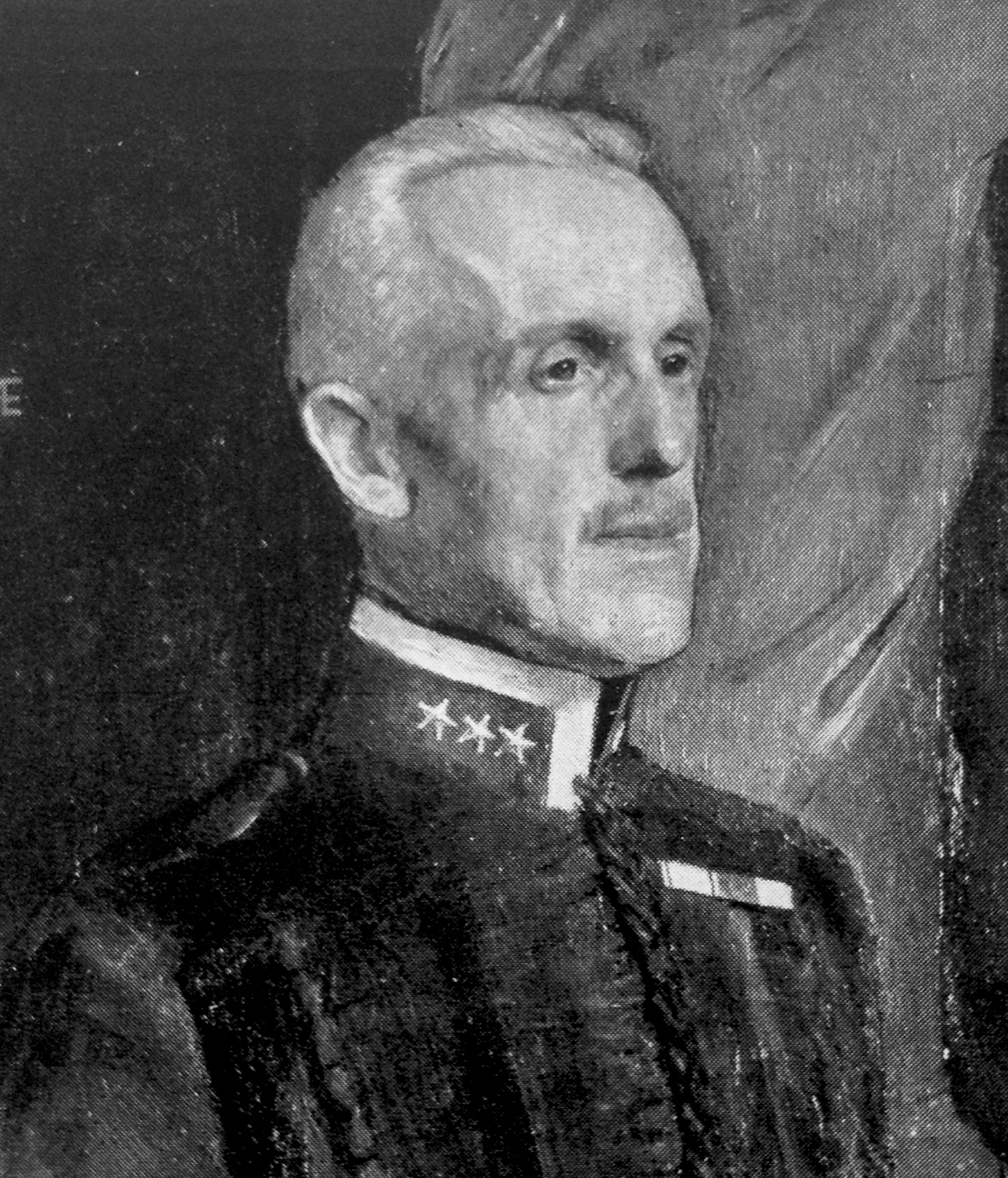 Porträtt (beskuret) av Reinhold von Rosen (1865-1946) målat av David Tägtström 1921. Ur "Svenska hem i ord och bilder", 1925.